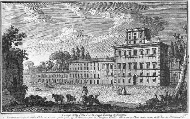 1) Main entrance; 2) Main Casino; 3) Buildings for the servants, hay-lofts and coach-houses (aka Case di Farfa); 4) Ruins of Terme di Diocleziano.